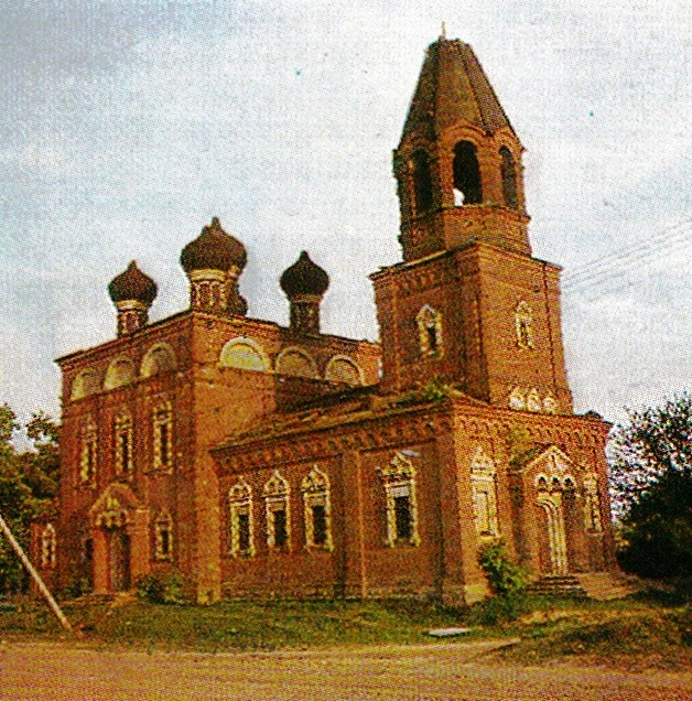 Здание церкви в деревне Телуша, 80-ые годы ХХ века